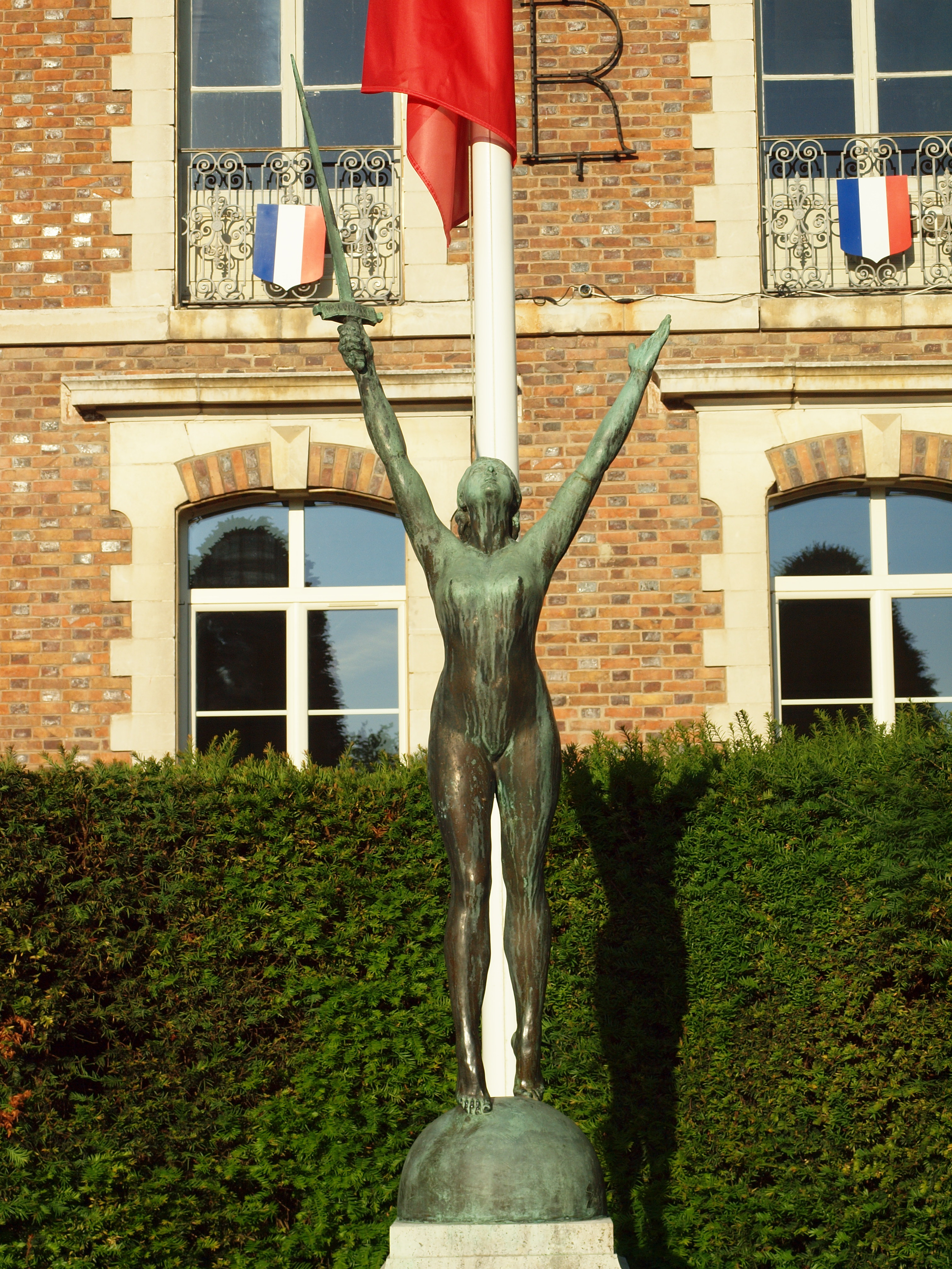 Monument aux morts de Chéroy (Yonne, France) ; il se trouve devant la mairie.